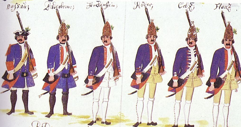 Figuren der Gudenus-Handschrift